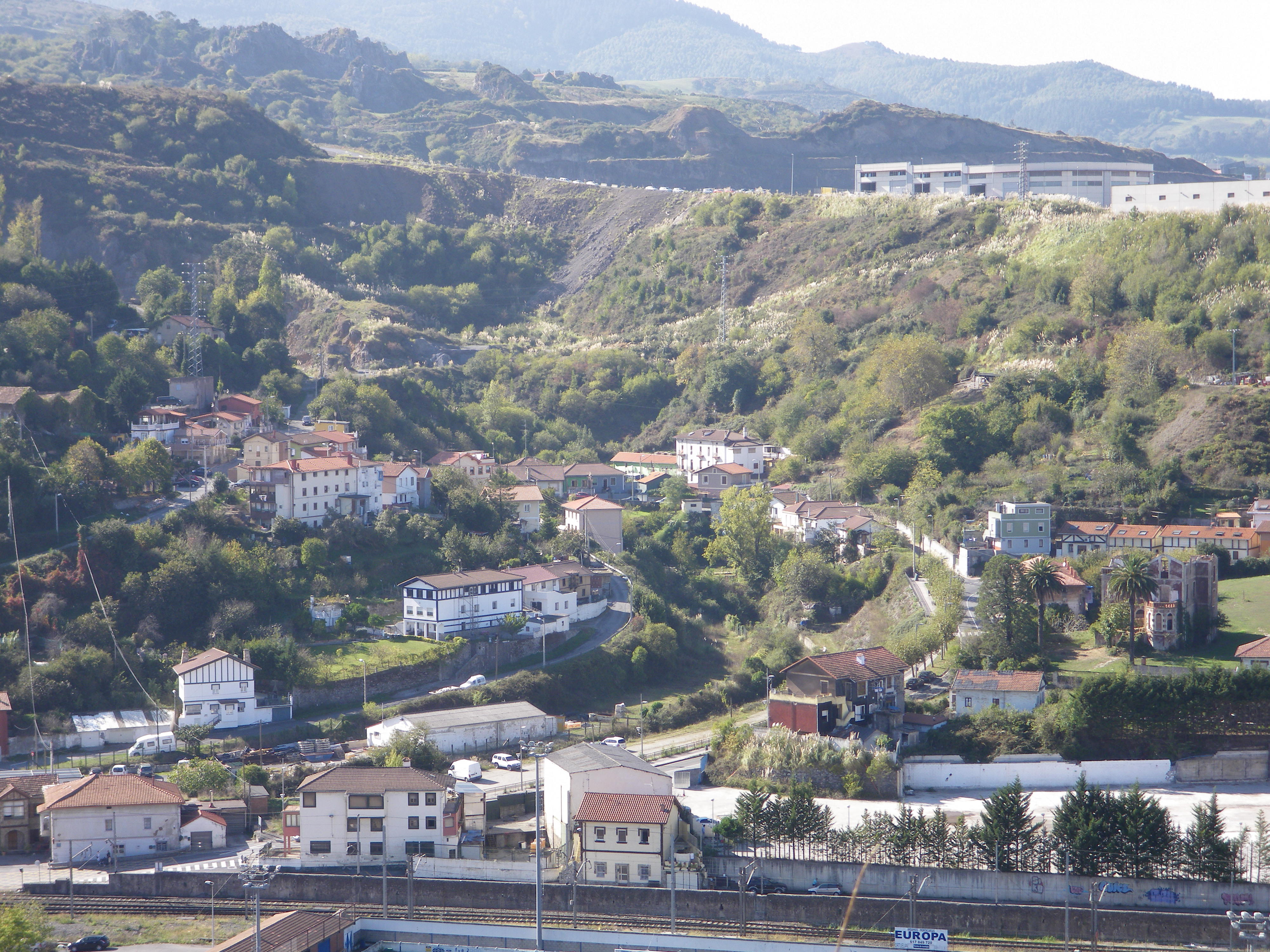 Urtuellako Bañales eta Saugal auzoak, Bizkaiko Meatzaldean, Eskurtuko begiratokitik ikusita.